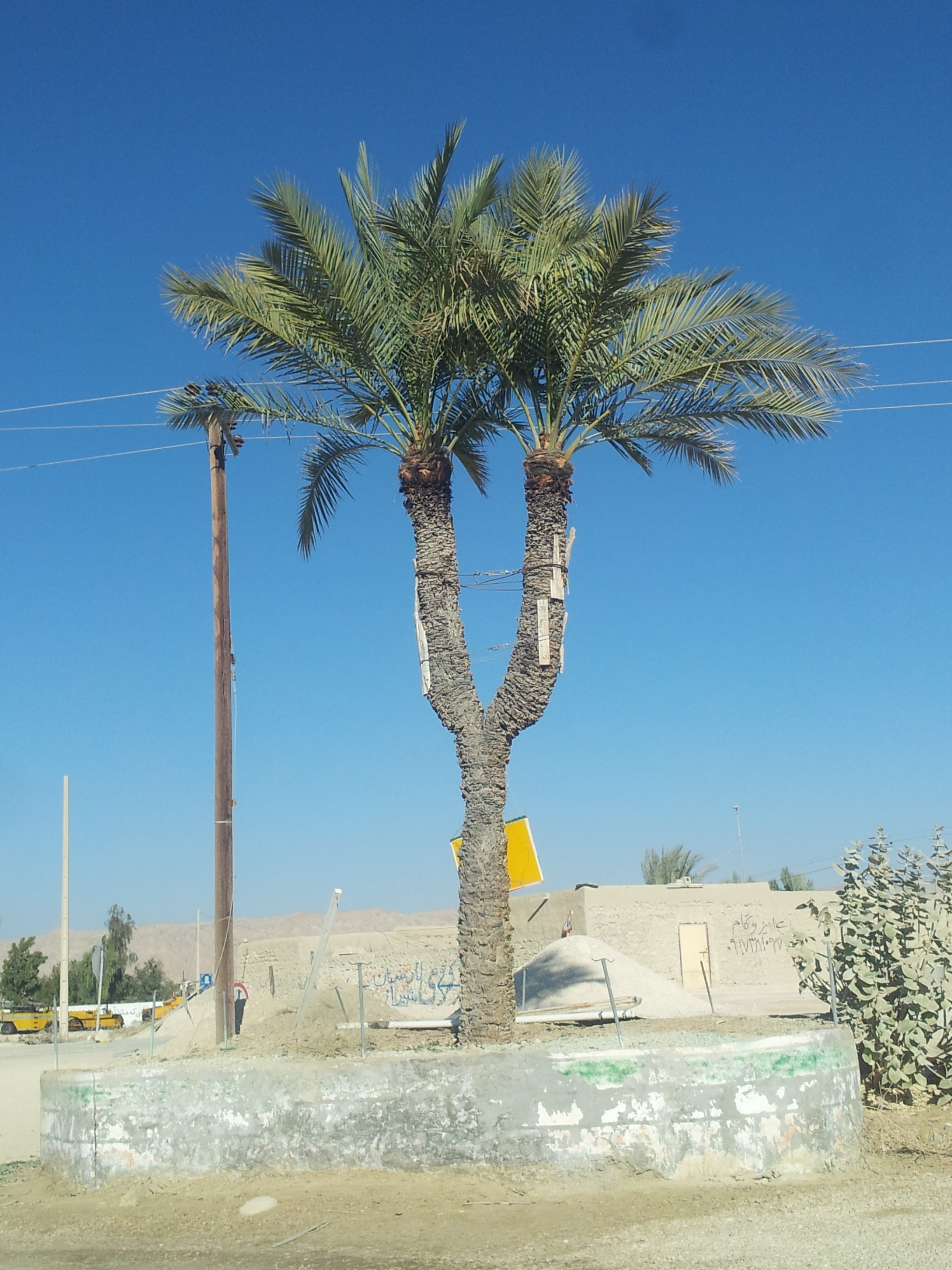 Palm tree in Cha Varz